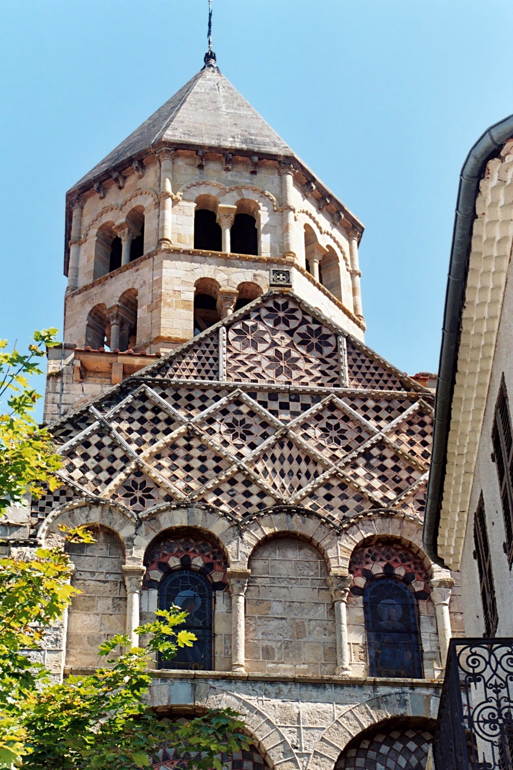 France - Auvergne - Église Saint-Julien de Chauriat